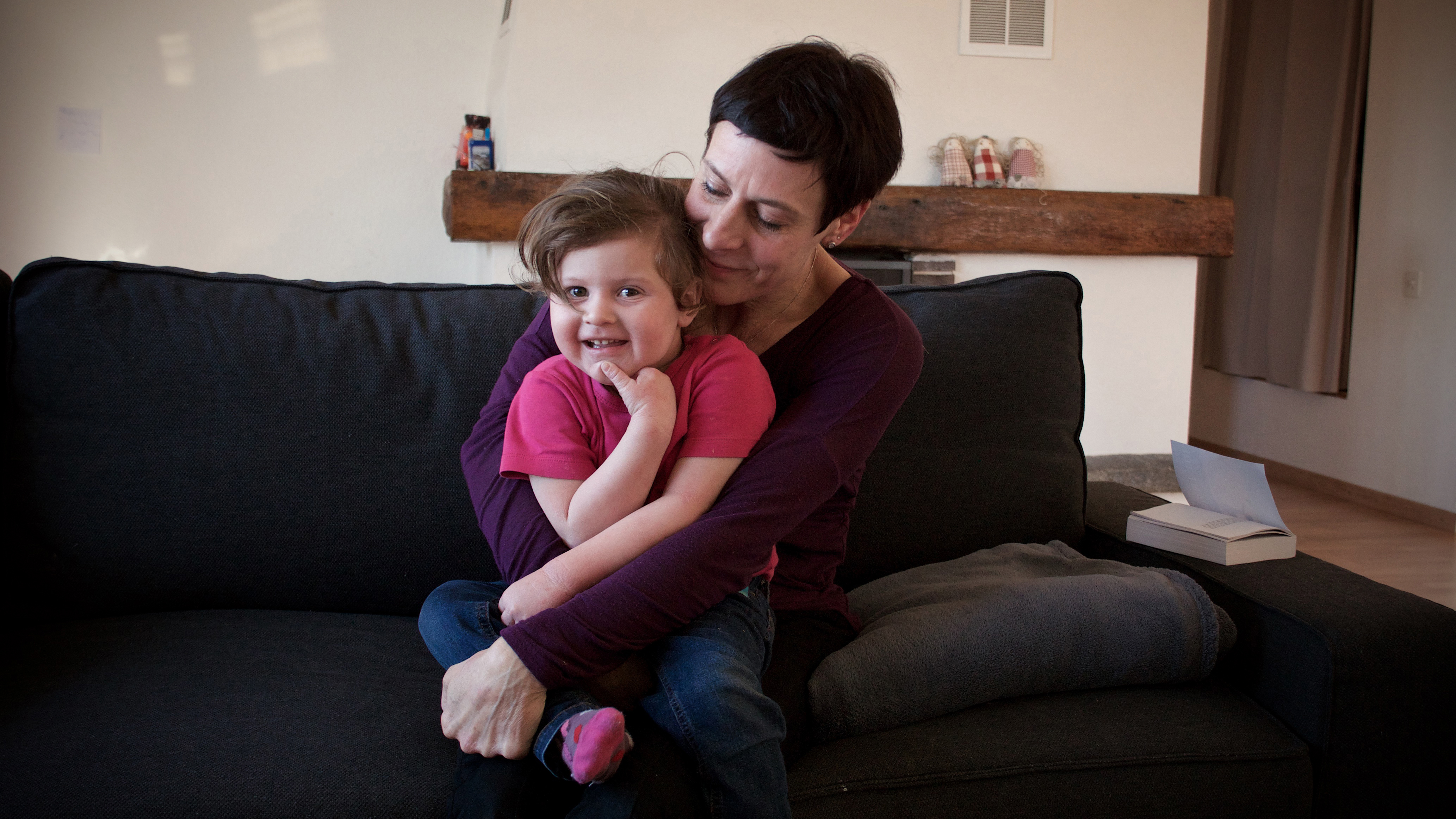 Chloé et sa maman Laurence.Image du film de Fernand Melgar " À l'école des Philosophes"